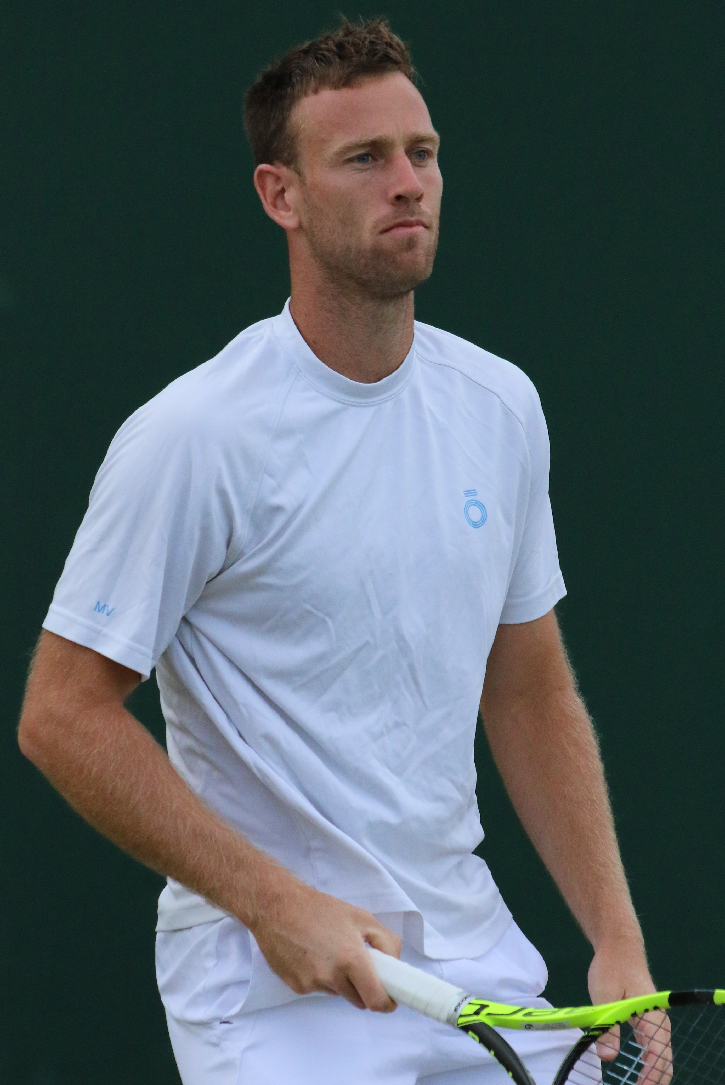 Venus WM16 (16)